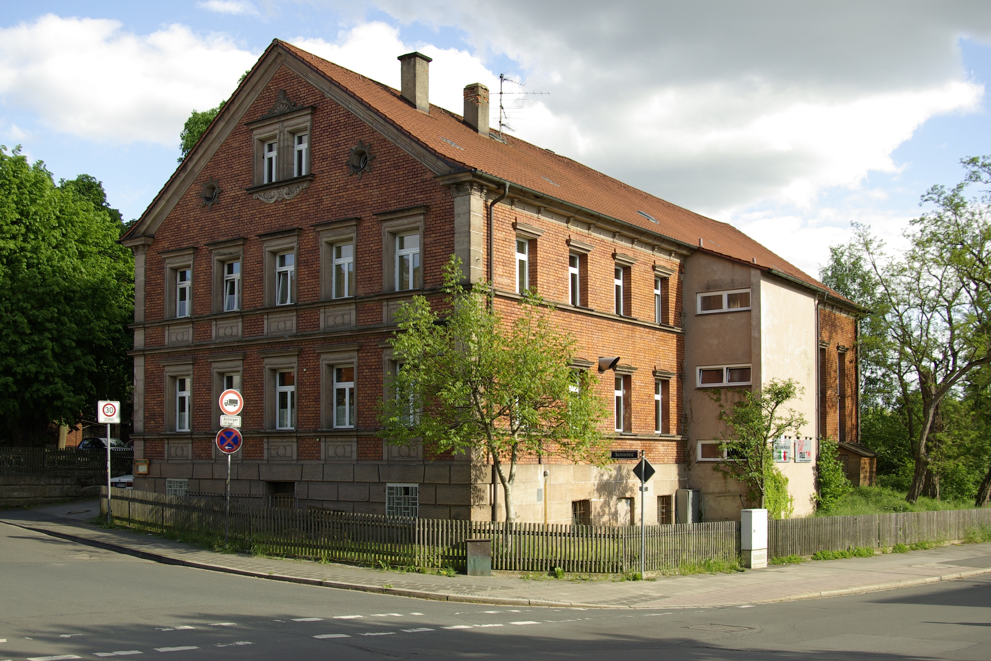 Das Gasthaus Brücken-Paulus (heute Pizzeria Romano) im Erlanger Stadtteil Sieglitzhof